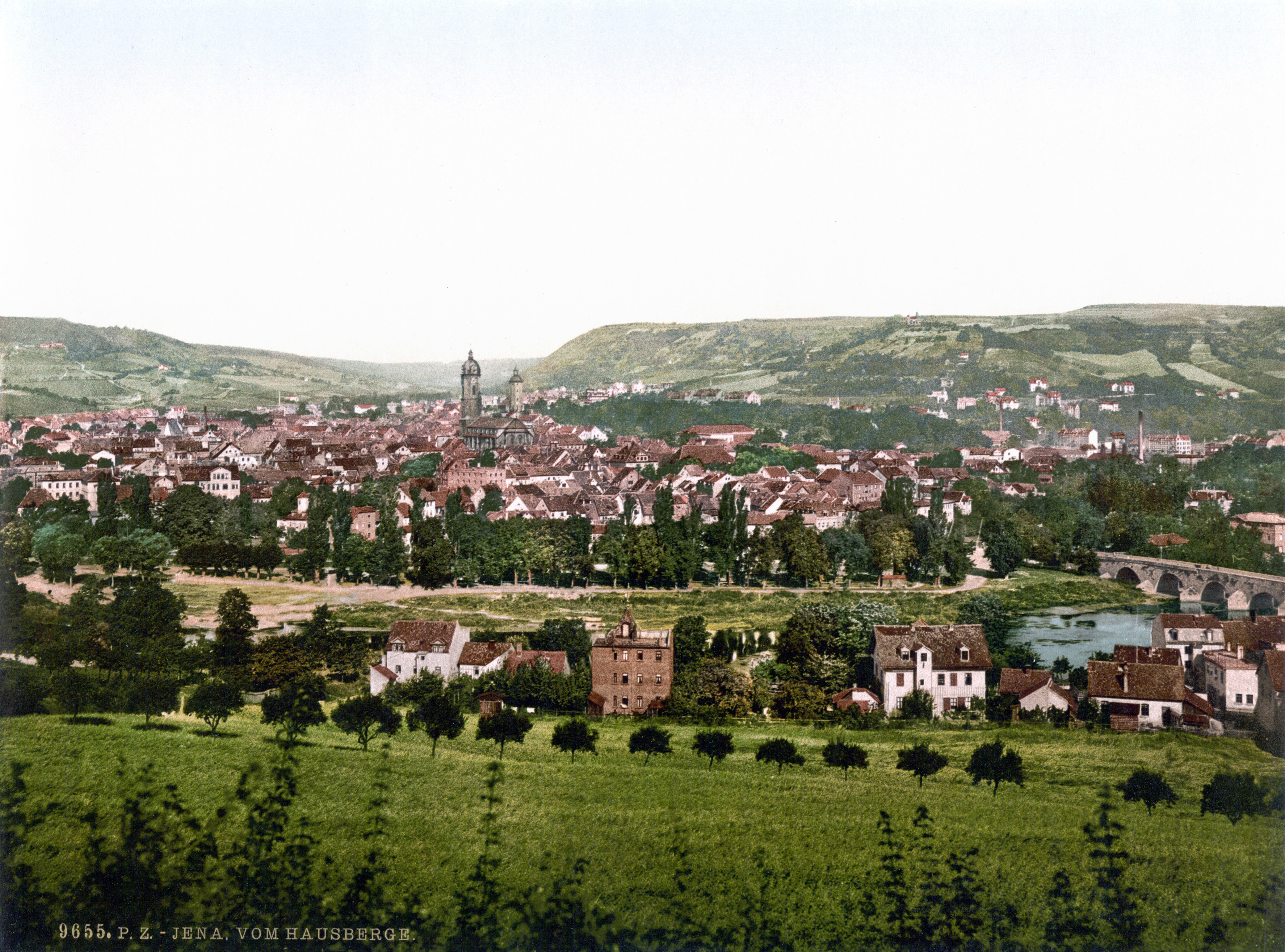 Jena um 1900